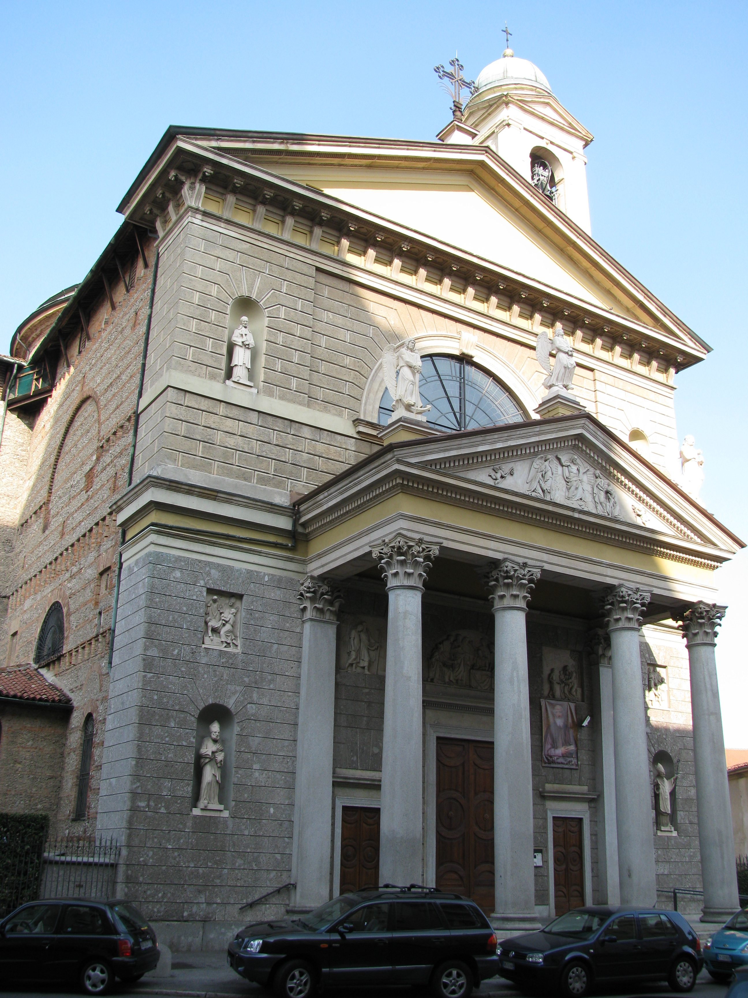 Facciata della Chiesa di San Gerardo (Monza - Milano)